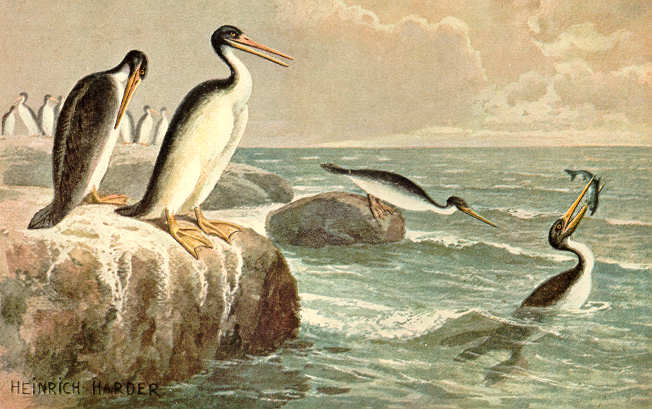 Hesperornis, ave buceadora no voladora con dientes, que se alimentaba de peces en la era secundaria.